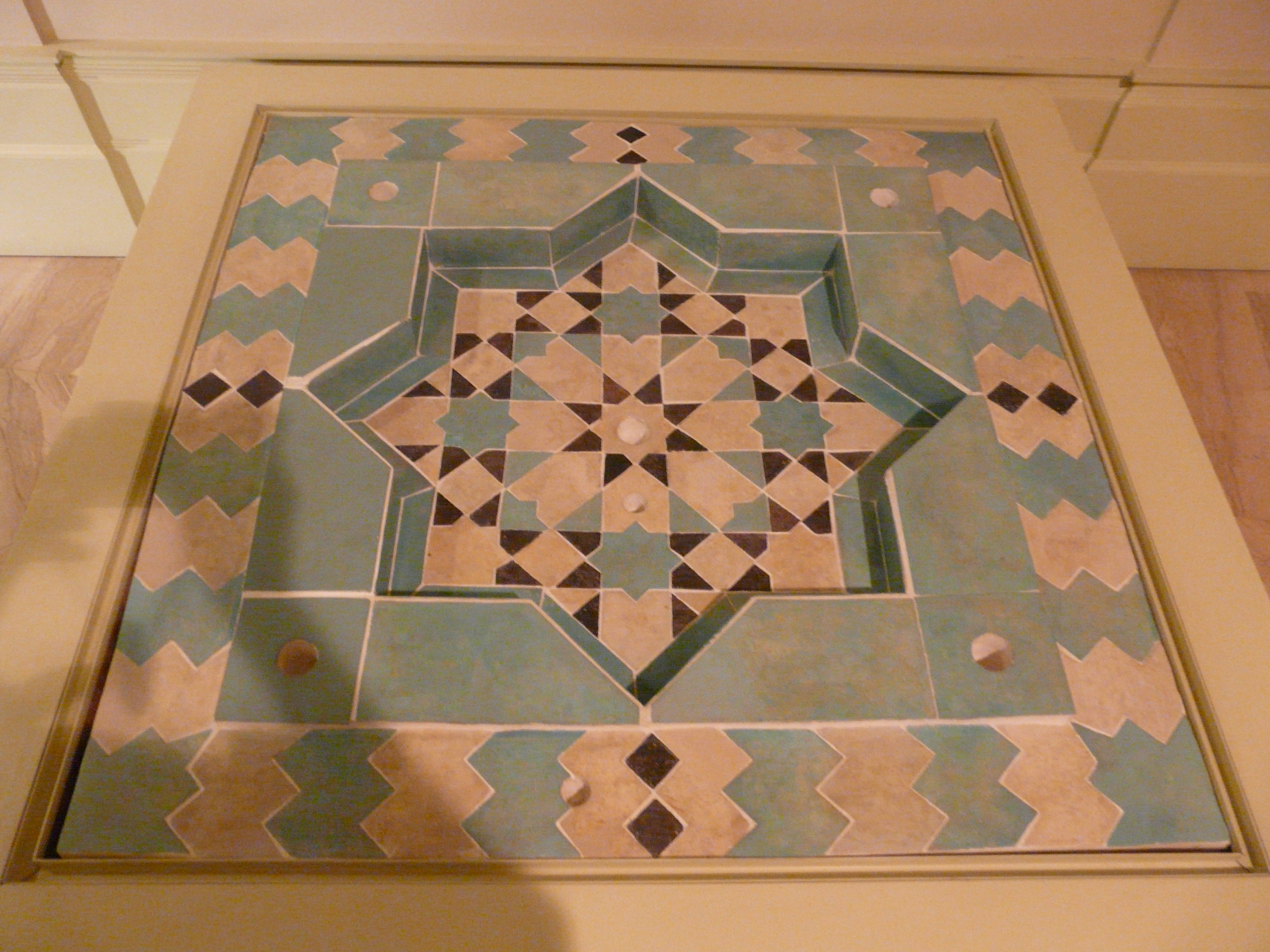 Palau del Marqués de Dosaigües (València) Object location39° 28′ 21.52″ N, 0° 22′ 29.32″ W